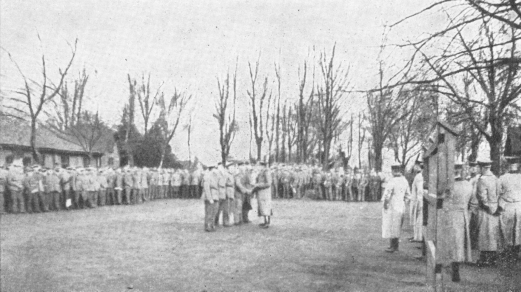 Description